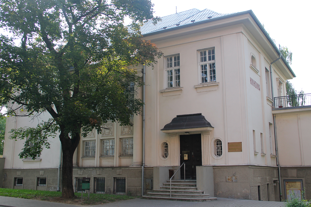 Budova ústřední knihovny na ulici Jiráskova, Jiráskova 506, Frýdek.